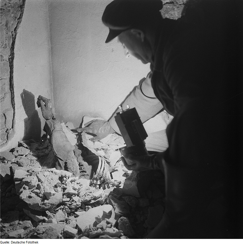 Original image description from the Deutsche Fotothek Leichnam in einem Luftschutzkeller